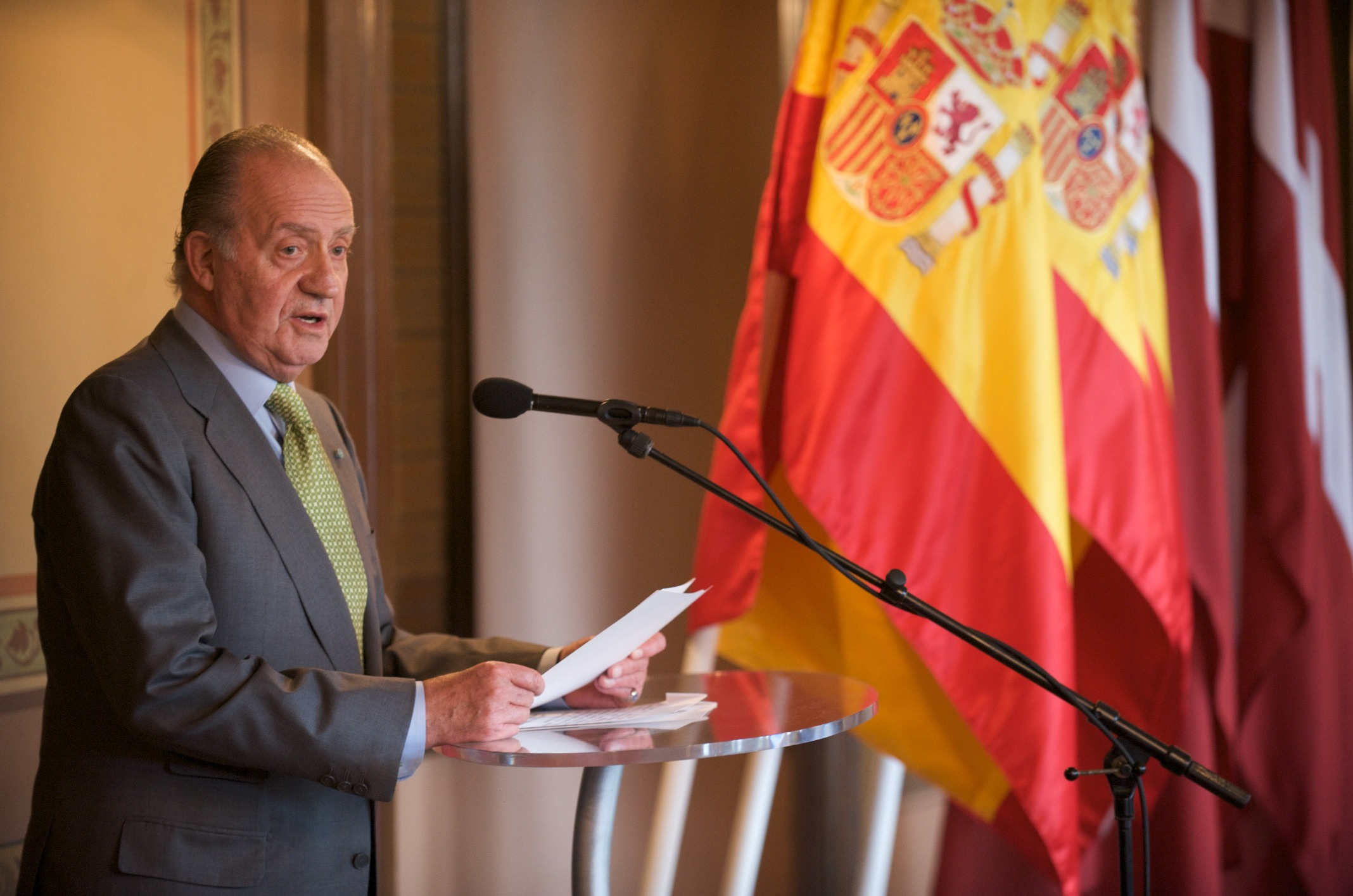 Ministru prezidents Valdis Dombrovskis oficiālās pusdienās tiekas ar Spānijas karali Huanu Karlosu I un karalieni Sofiju